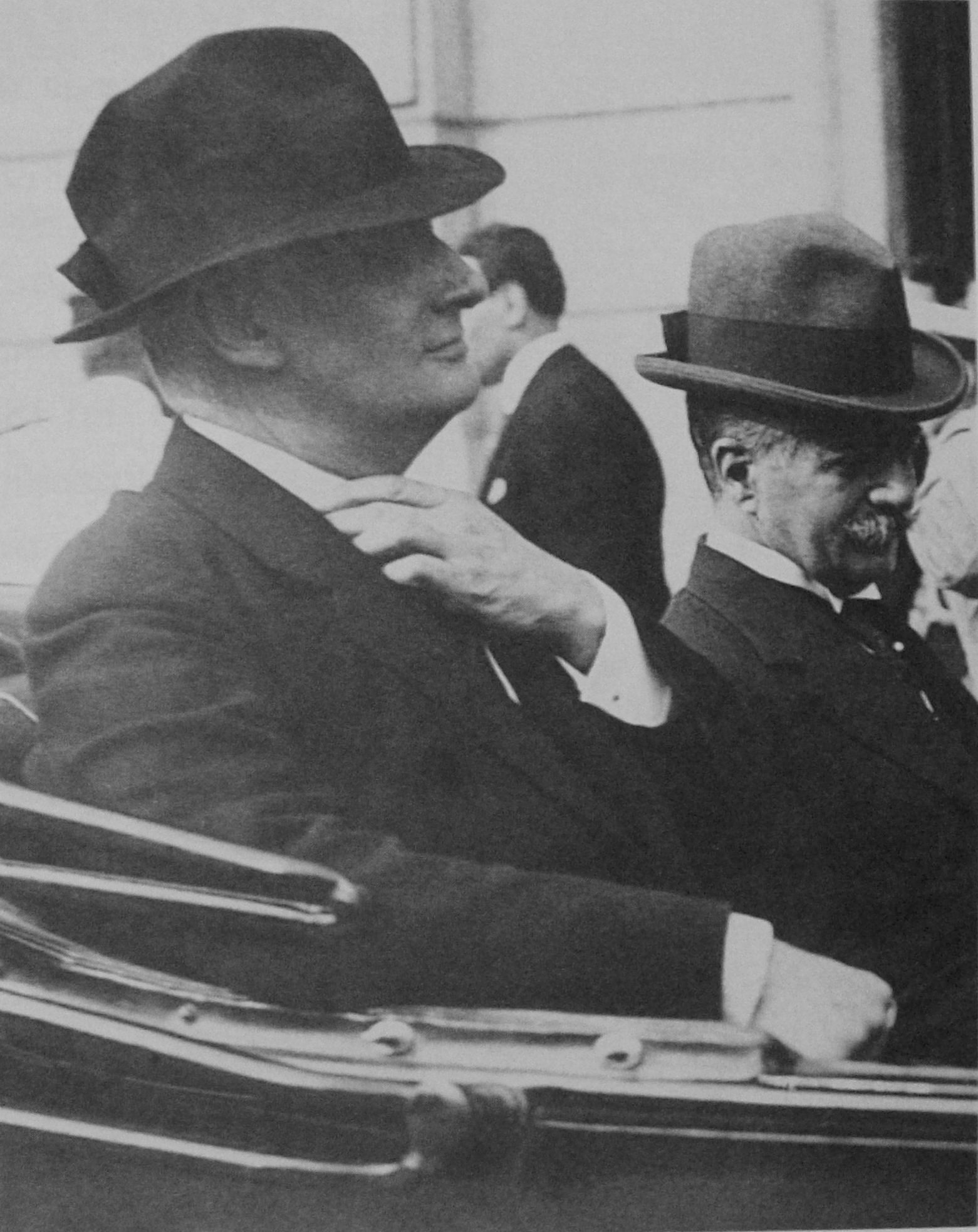 Después de 6 años en Paría, como embajador, Alvear retorno a la Argentina como presidente. En la foto esta haciendo una escala en Rio de Janeiro en su viaje de regreso.